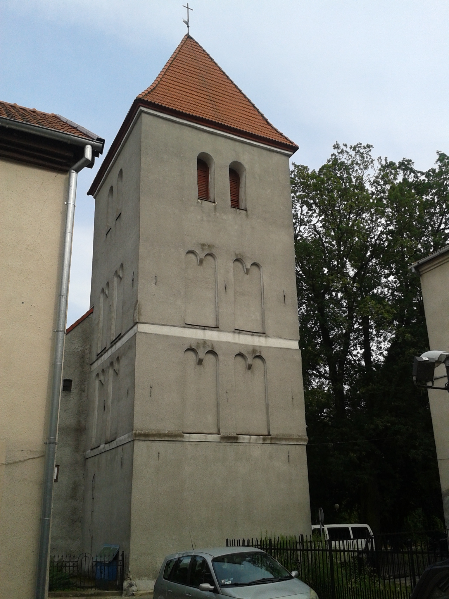 Kościół św. Trójcy w Mrągowie